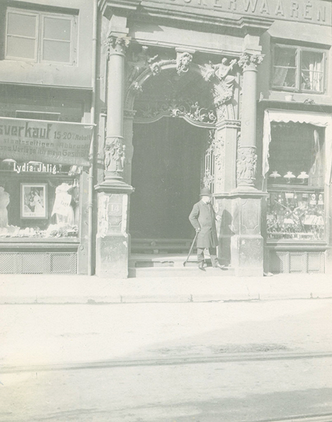 Portal von "Reese und Wichmann" am Speersort 12/14 in Hamburg.